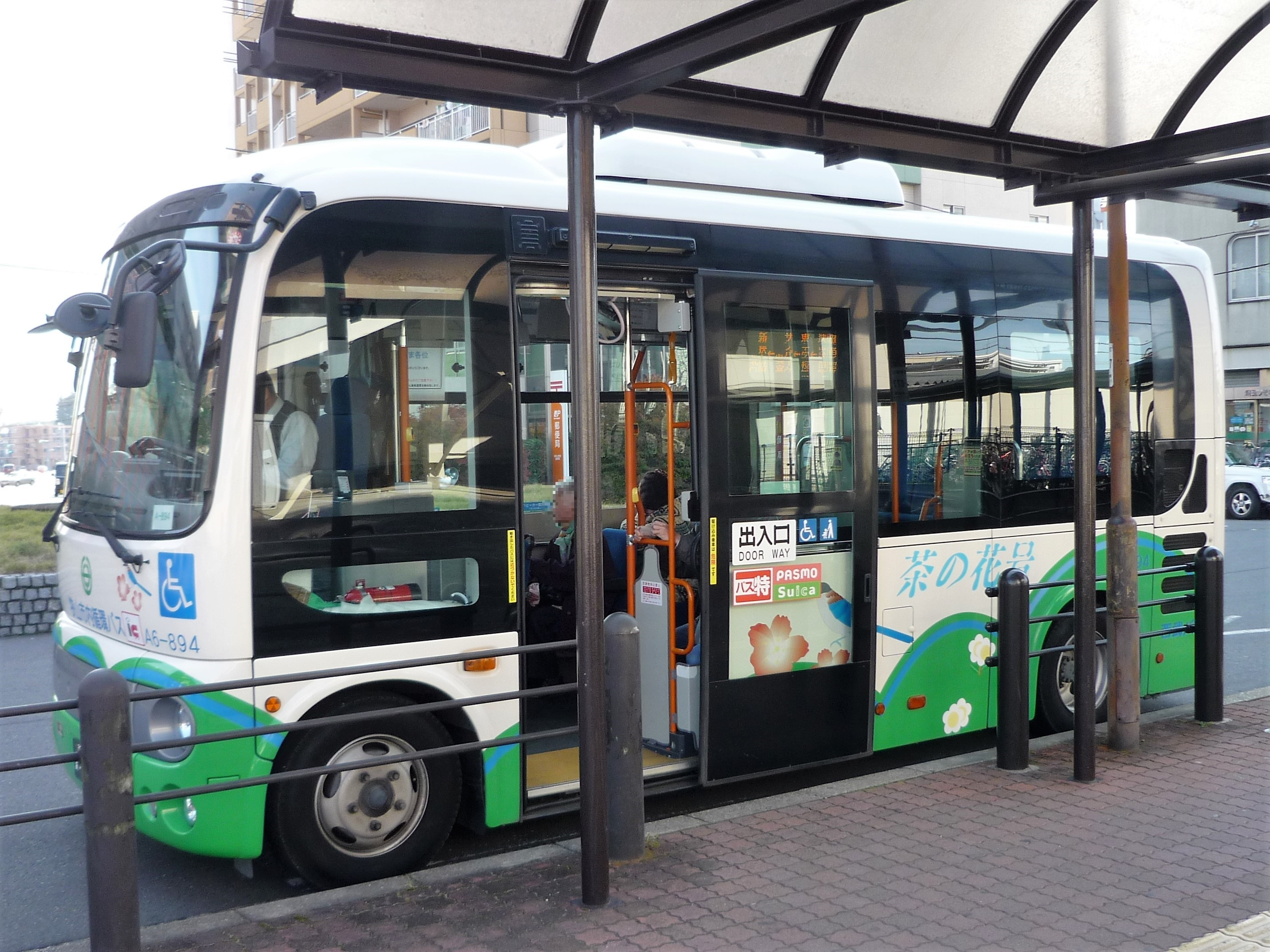 新狭山駅南口に停車中の狭山市内循環バス「茶の花号」 Panasonic Lumix DMC-FS3